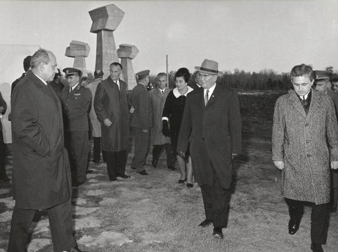 Tito u obilasku spomen parka Bubanj